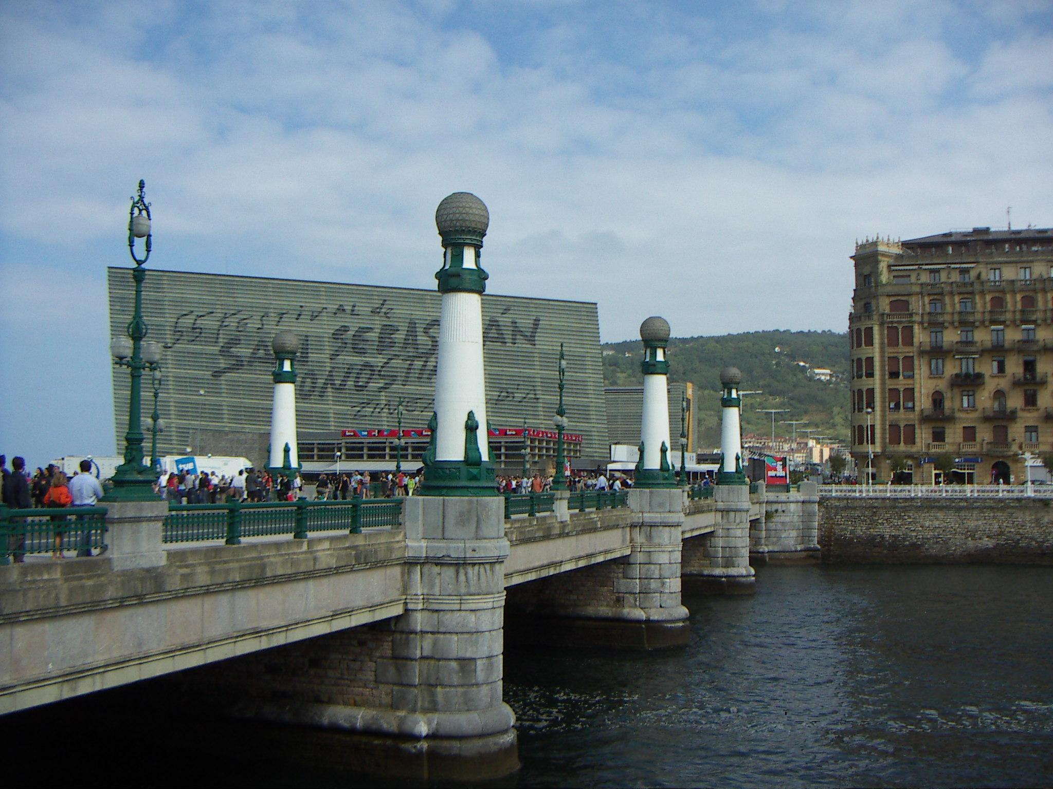 Puente del Kursaal, San Sebastián (España)